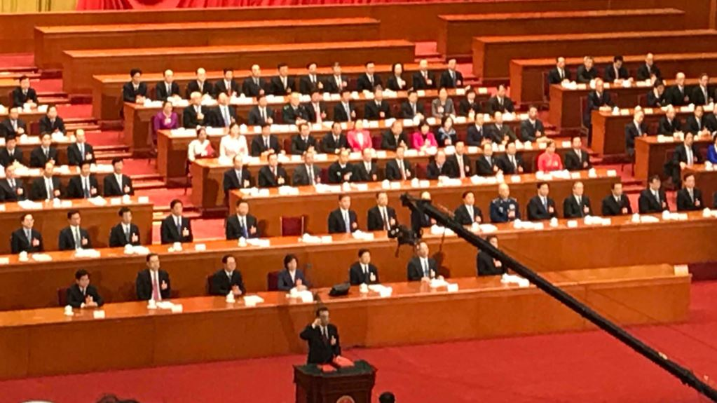 中文（中国大陆）: 李克强获连任中国总理后当场宣誓。（美国之音叶兵拍摄）